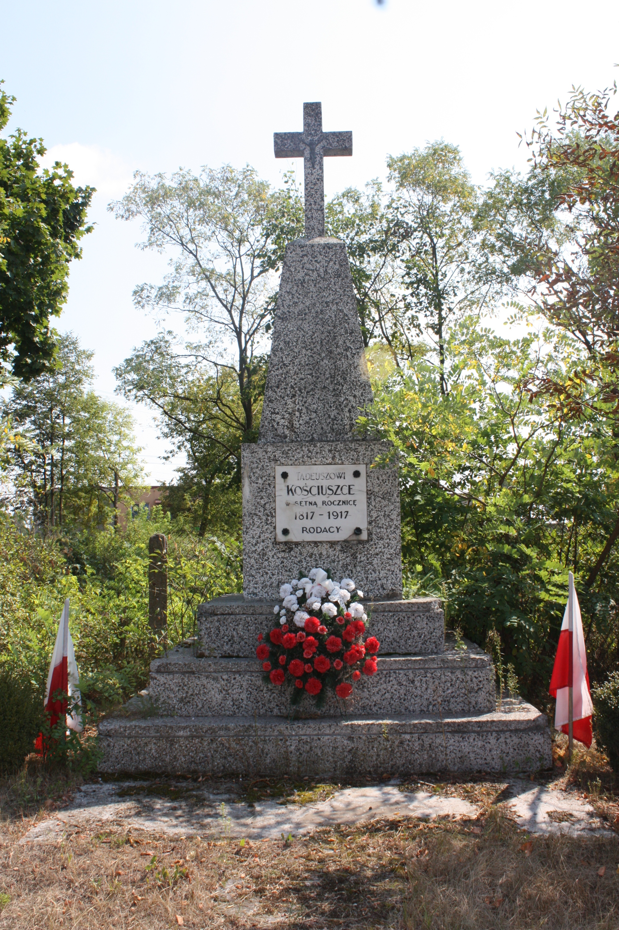 Sadowne, pomnik Tadeusza KościuszkiLietuvių: Sadovnė, Paminklas Tadui Kosciuškai